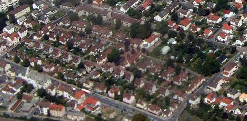 Bildausschnitt: Hier die Cramer-Klett-Siedlung in Gustavsburg